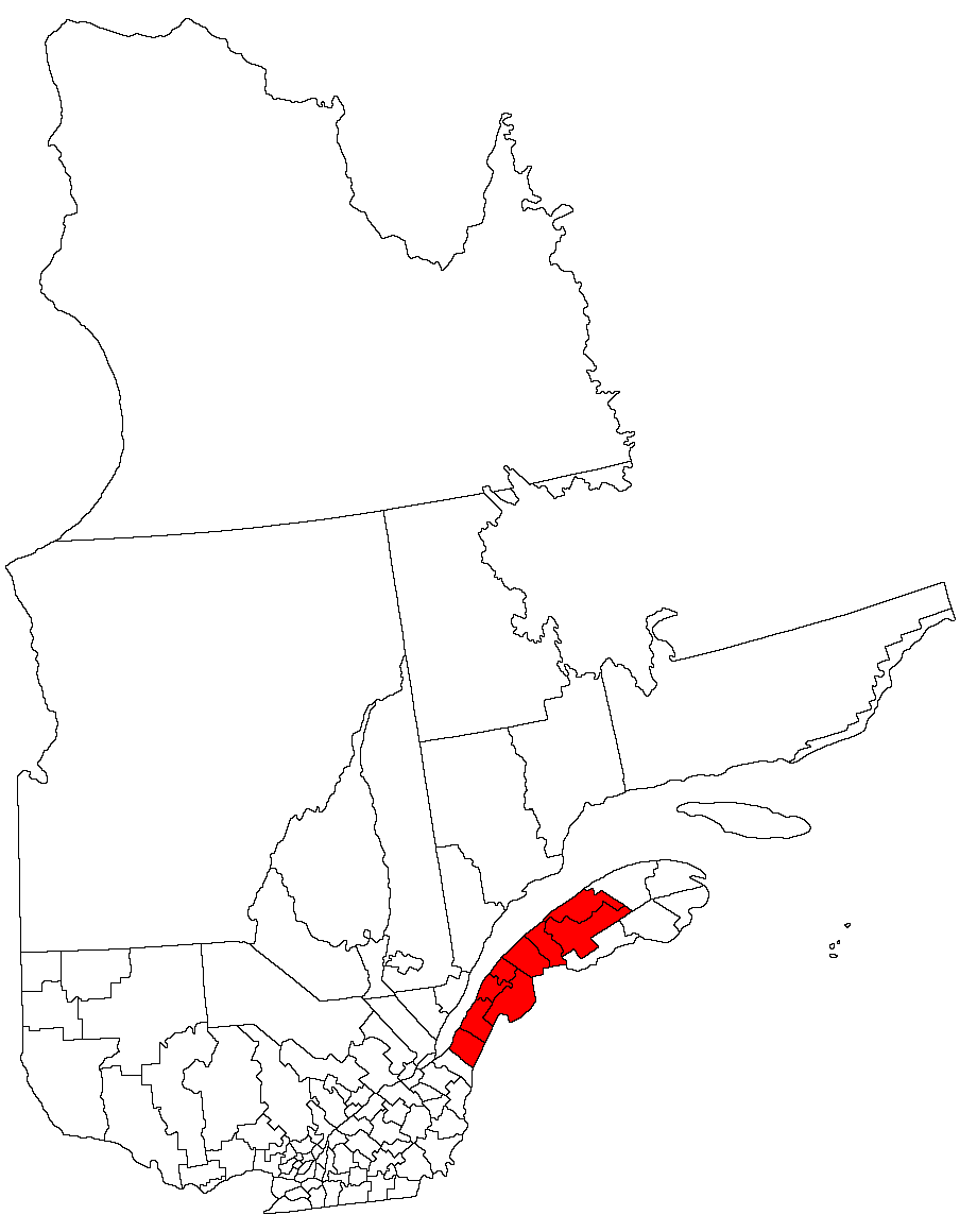 Bas-Saint-Laurent region, Quebec